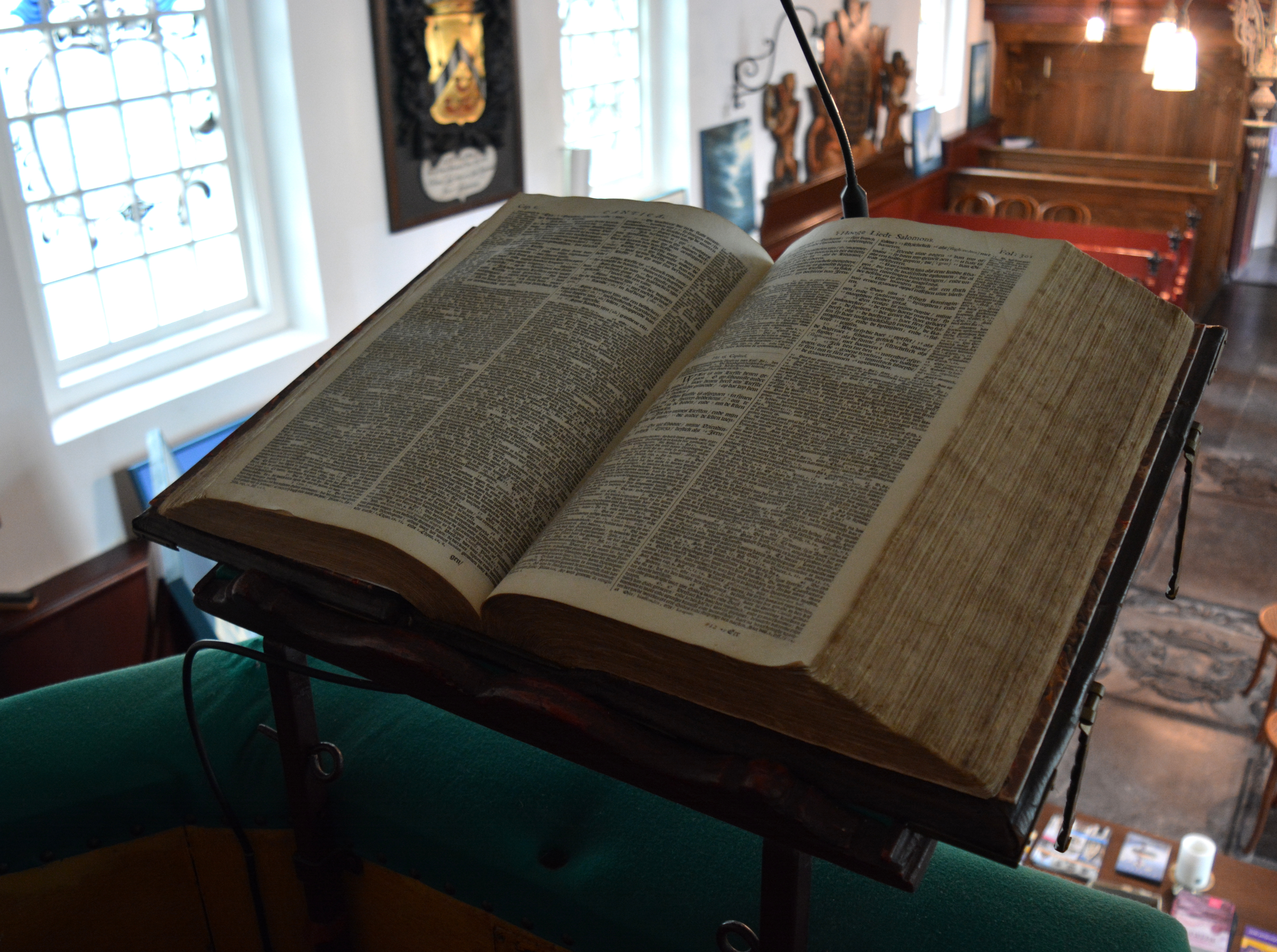 Gertrudistsjerke, Idaerd, kânselbibel